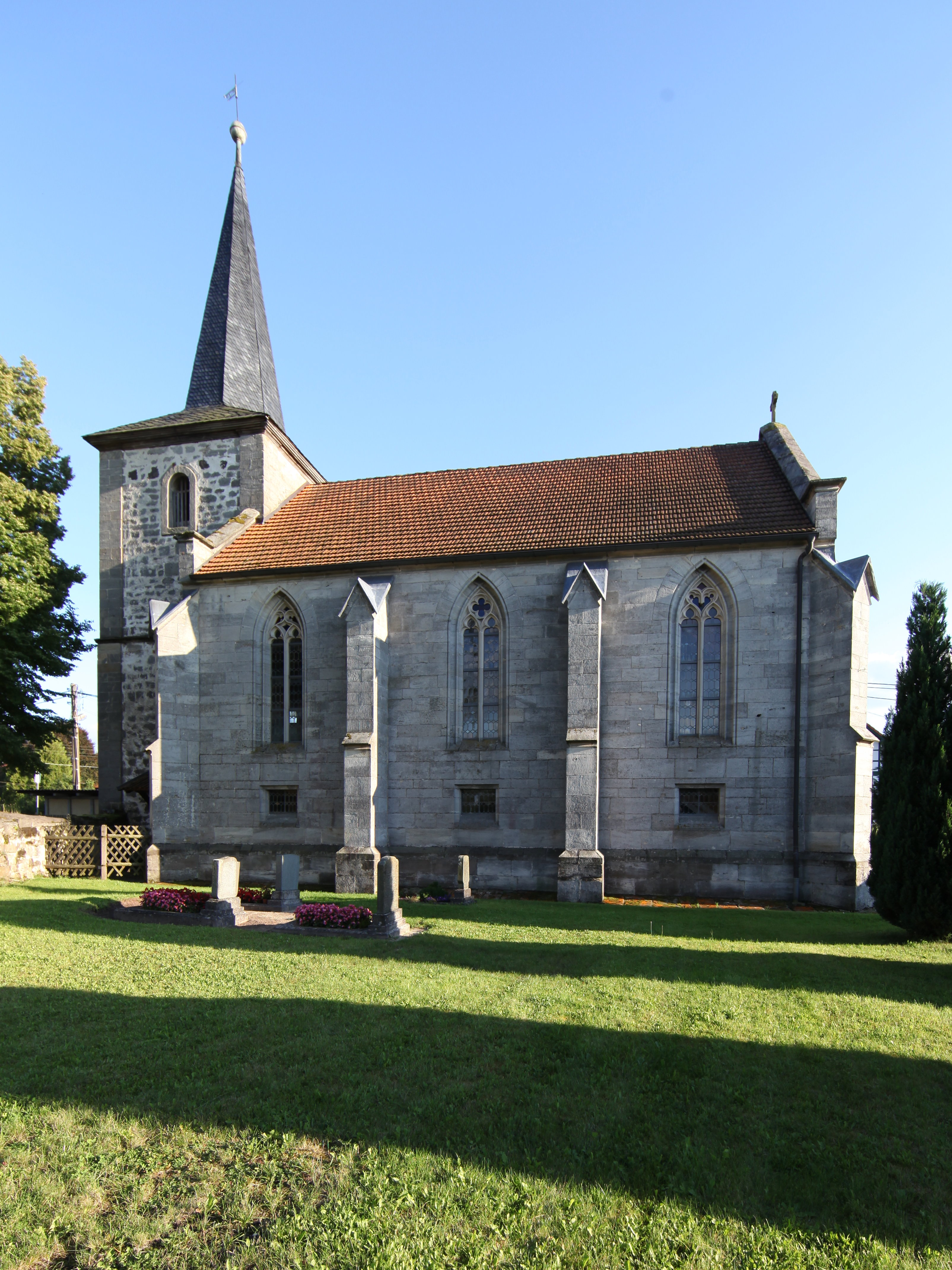 evangelisch-lutherische Kirche St. Marien in Poppenhausen